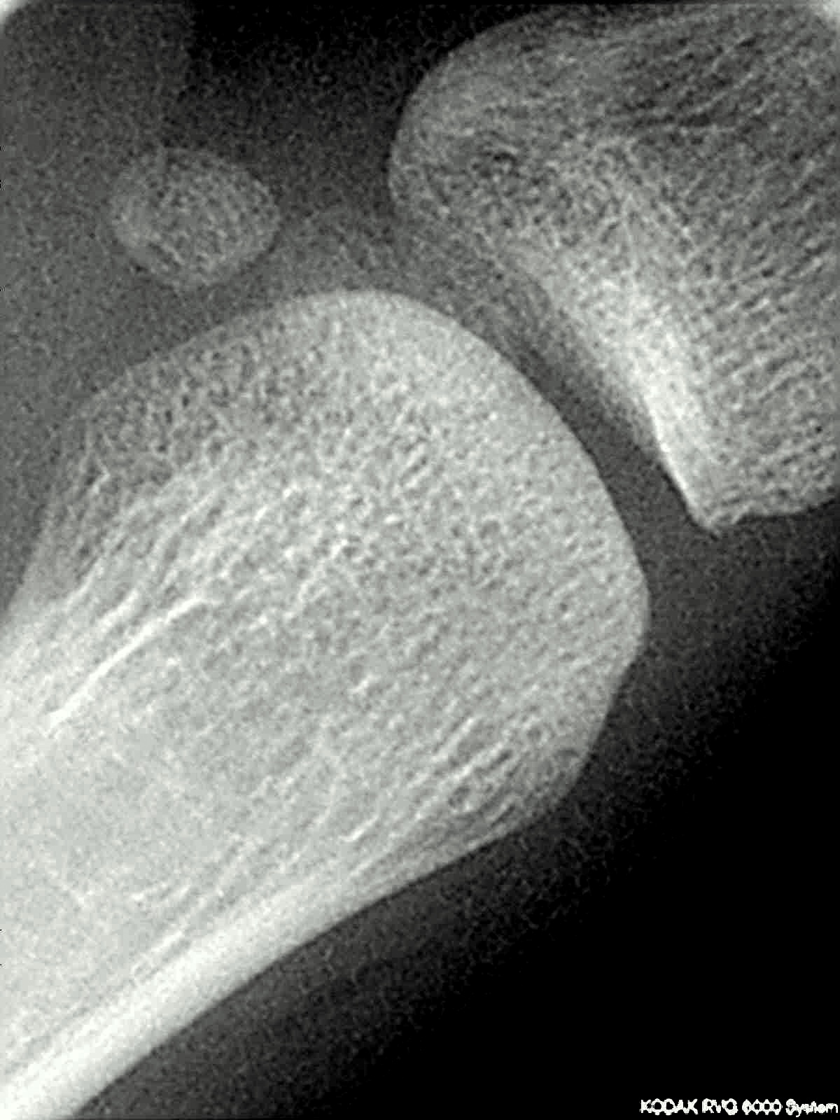 Radiographie aux rayons X de l'articulation entre le 1er métacarpe et la phalange proximale du pouce. On note la présence des os sésamoïdes médial et latéral.